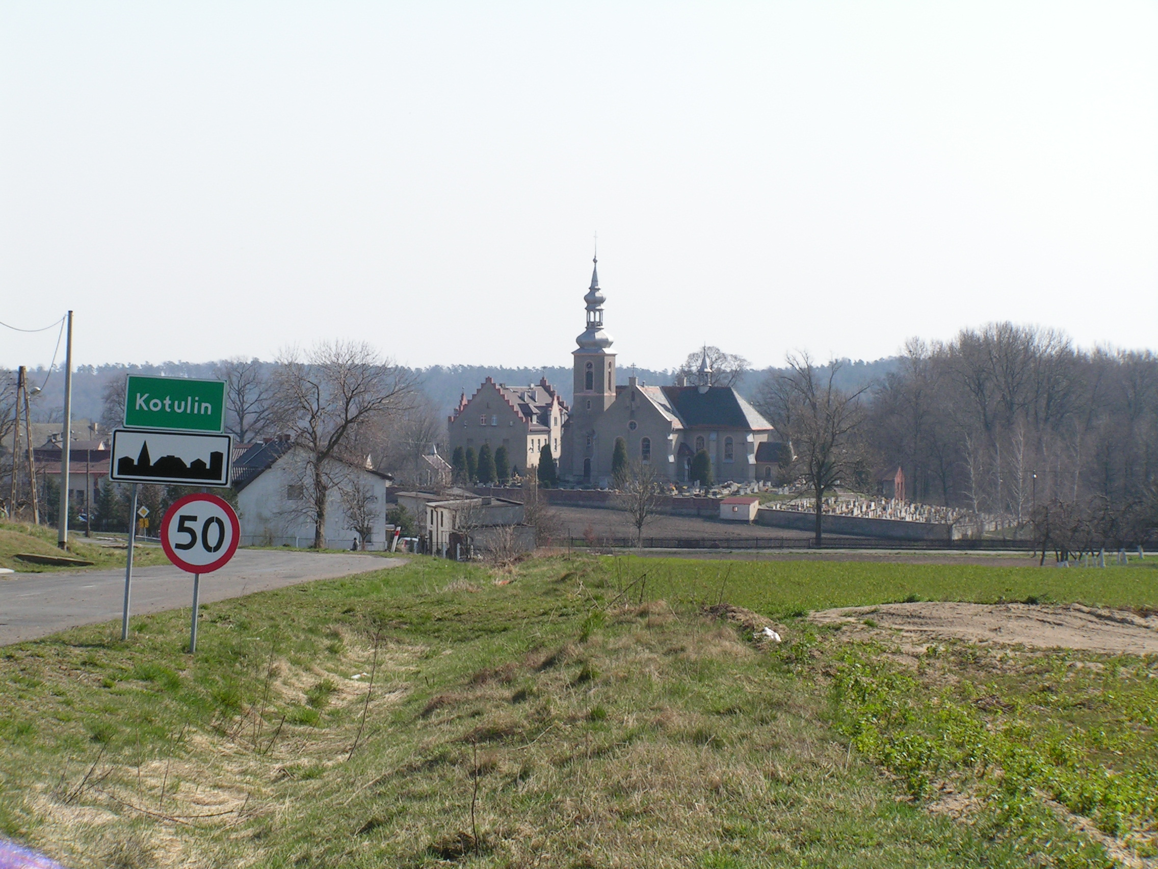 Kotulin - widok na kościół i szkołę od strony Błotnicy Strzeleckiej